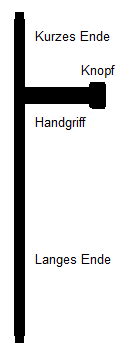 Tonfa